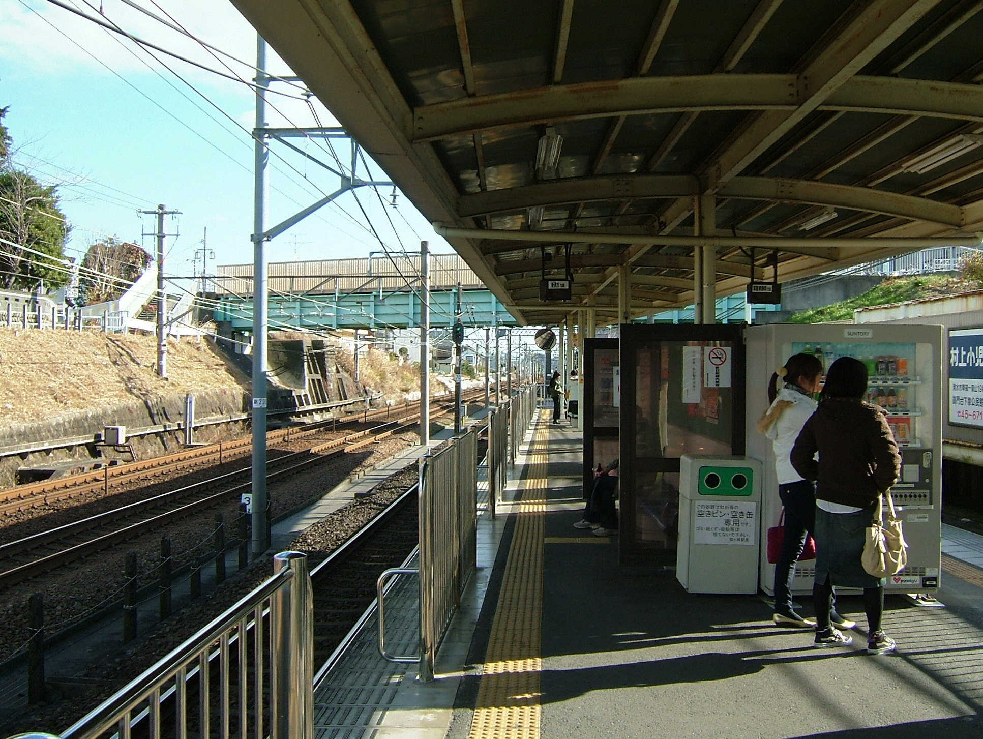 静岡鉄道狐ヶ崎駅プラットホーム